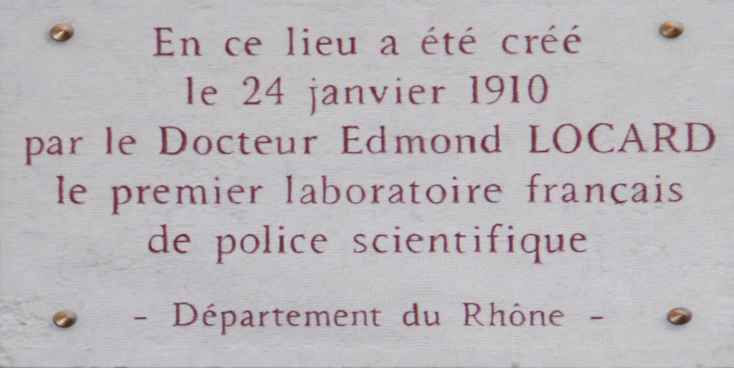 Plaque commémorative du premier laboratoire français de police scientifique-Palais de Justice de Lyon .